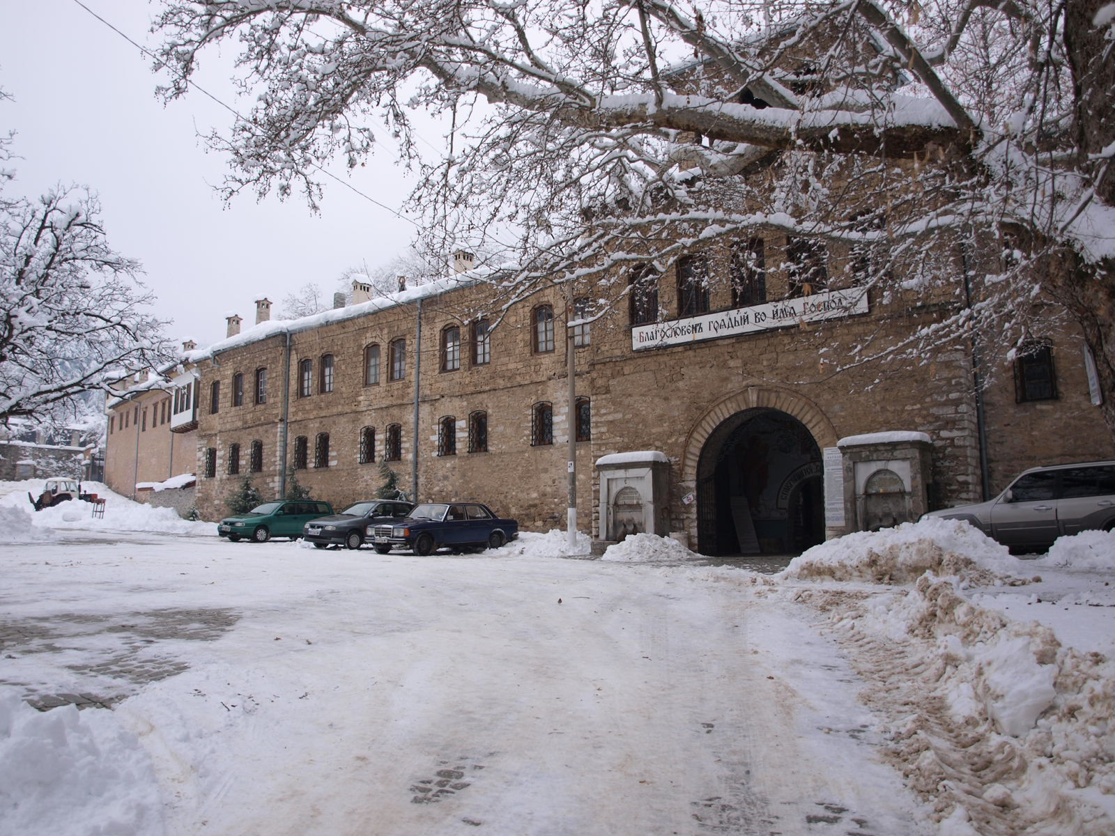 Vchod do areálu Bačkovského kláštera v zimě, Bulharsko